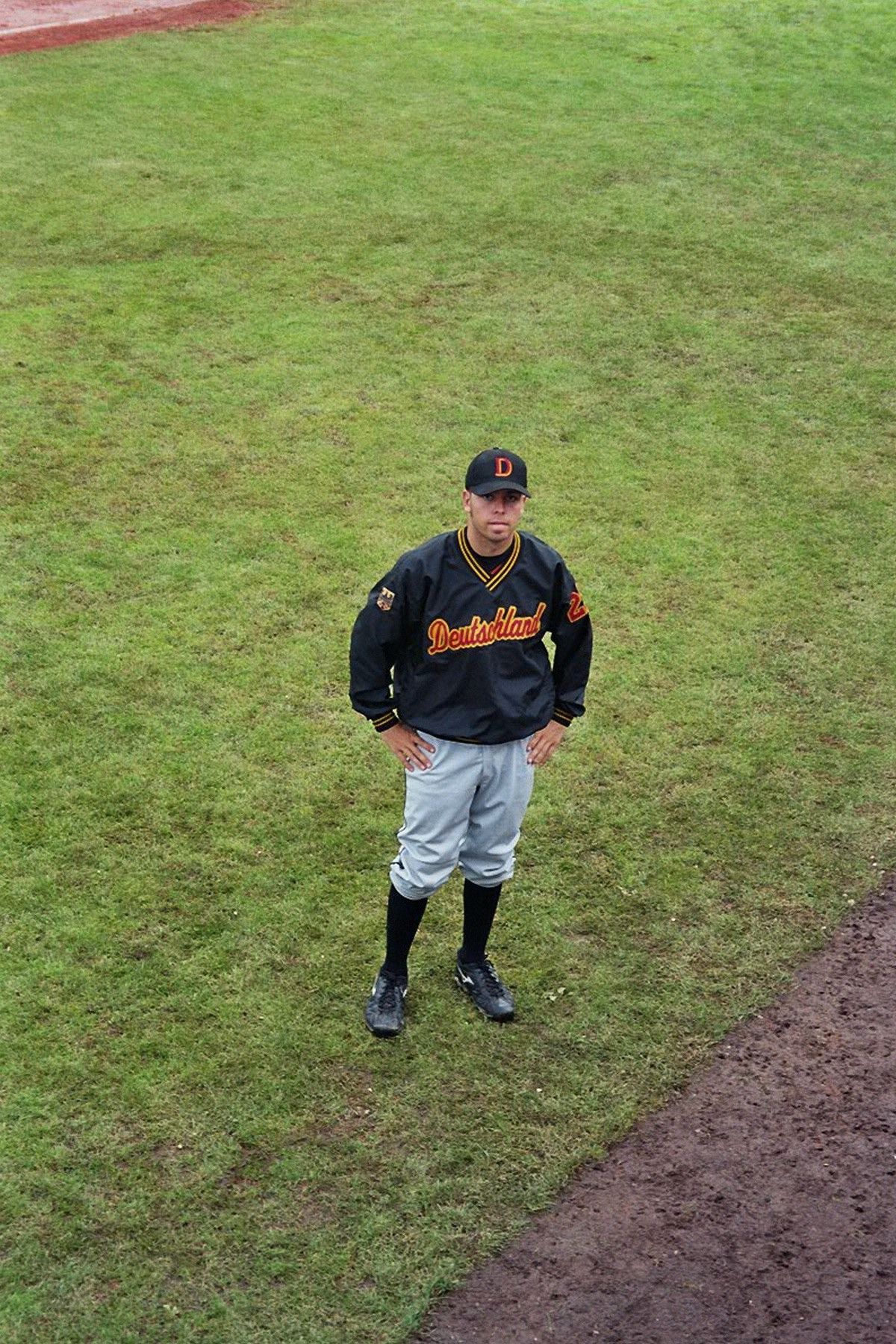 Dirk Fries bei dem Baseball-EM '05 in Prag